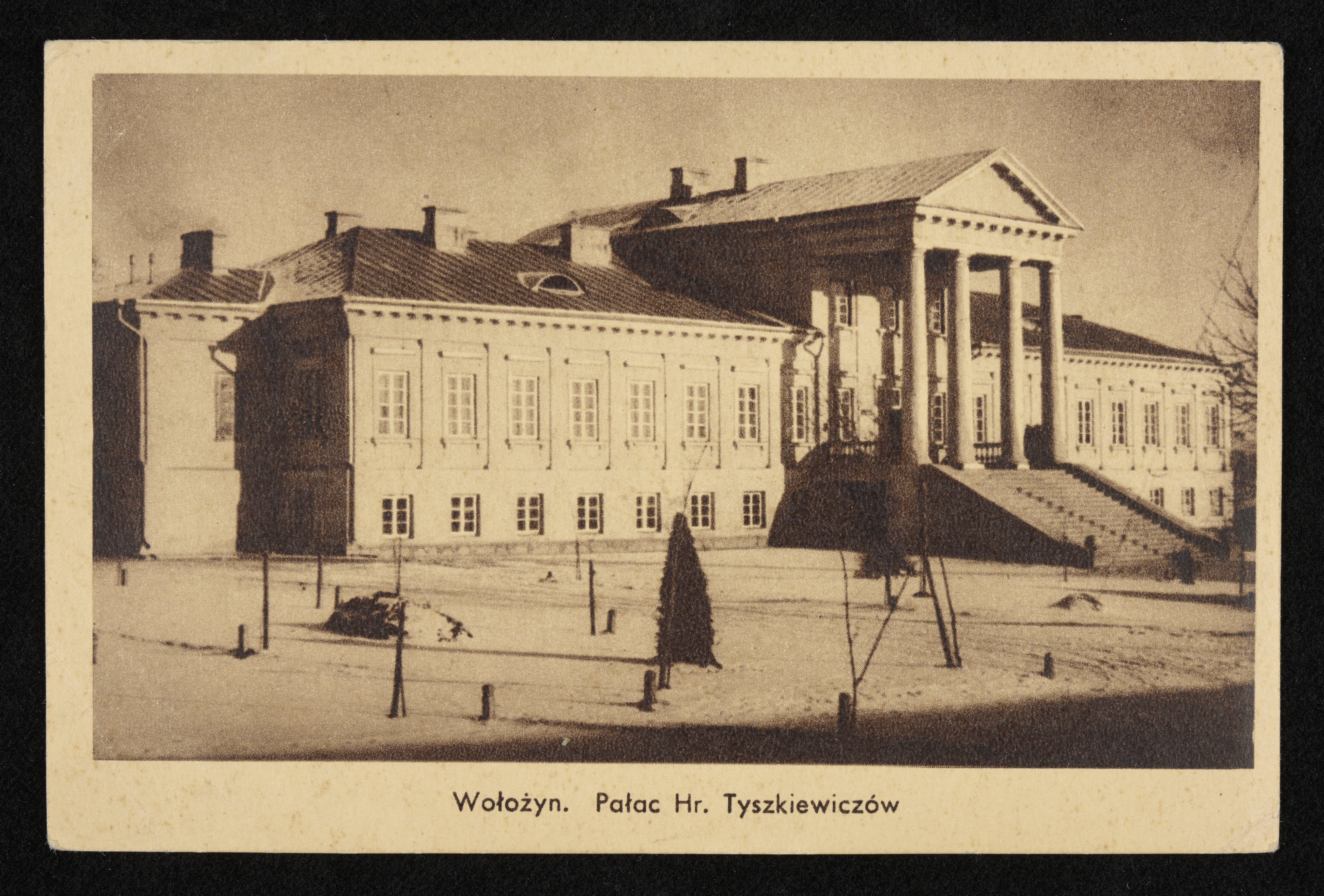 Беларуская (тарашкевіца): Валожын (Vałožyn), палац Тышкевічаў (Tyškievič)